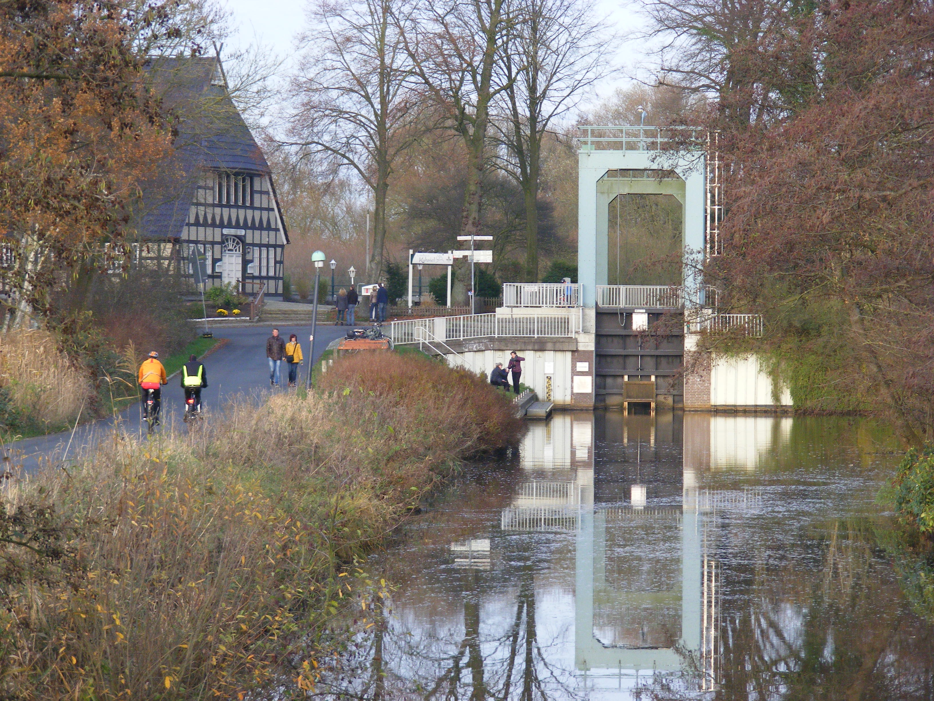 Schleuse und Gasthaus Kuhsiel von der südlich benachbarten Brücke über den Kuhgraben